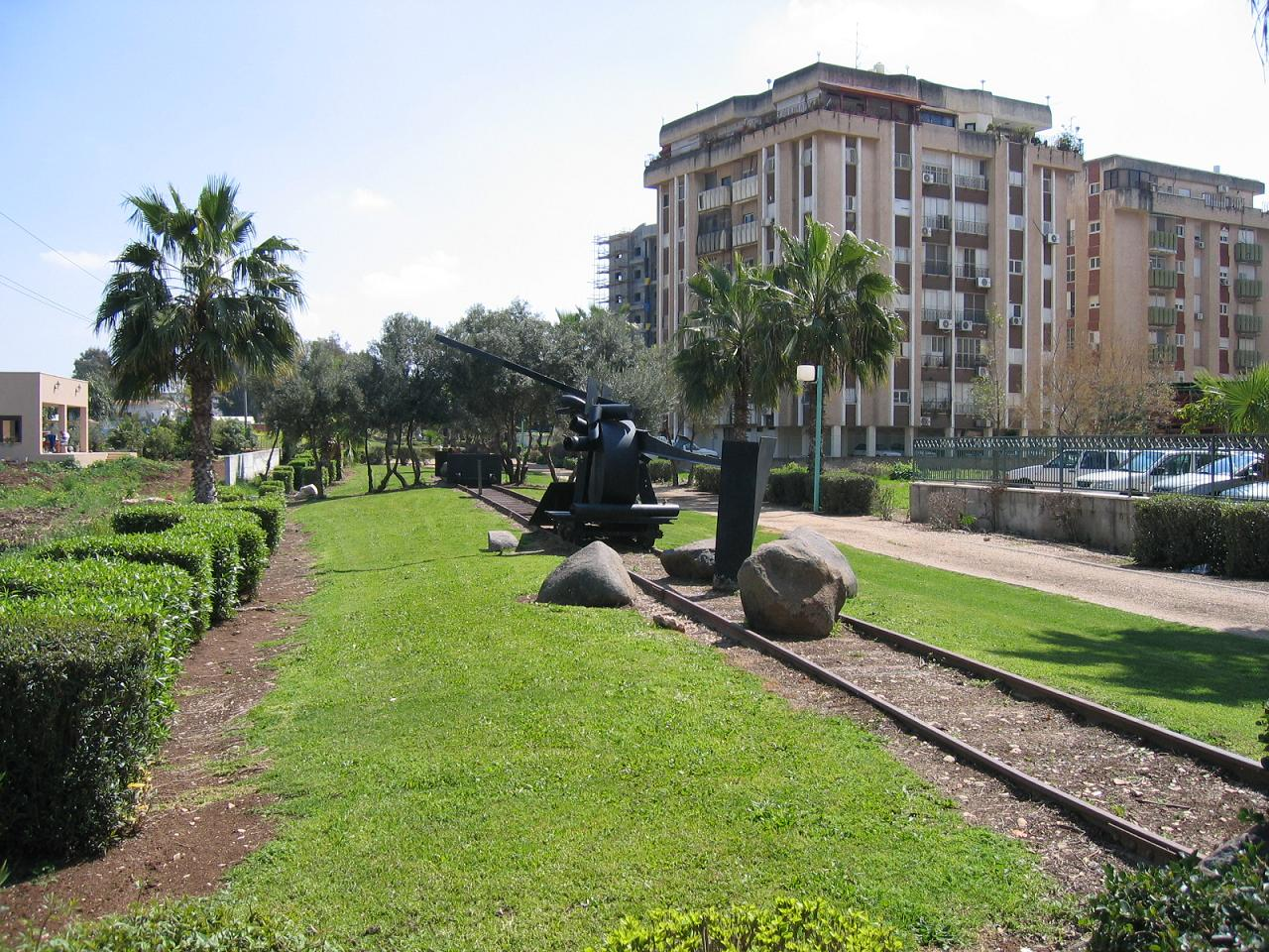 תוואי רכבת העמק בעפולה.צילום לכיוון מזרח.צילמתי והעלתי במרץ 2006.אסף.צ 15:52, 11 מרץ 2006 (UTC)